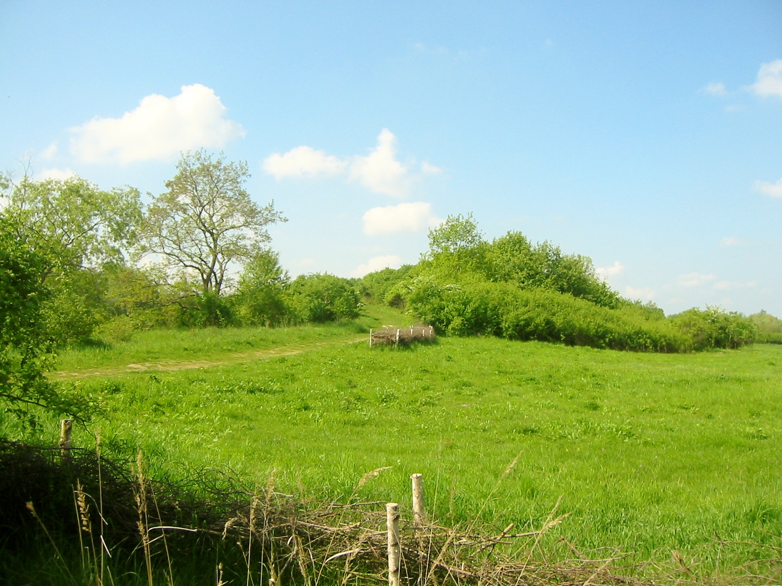 Blick auf den Alpengipfel, eine rund 80 Meter hohe Erhebung im Park. Der Freizeitpark Marienfelde liegt im gleichnamigen Ortsteil in Berlin. Er ist rund 40 Hektar groß und wurde auf einer ehemaligen Mülldeponie errichtet.